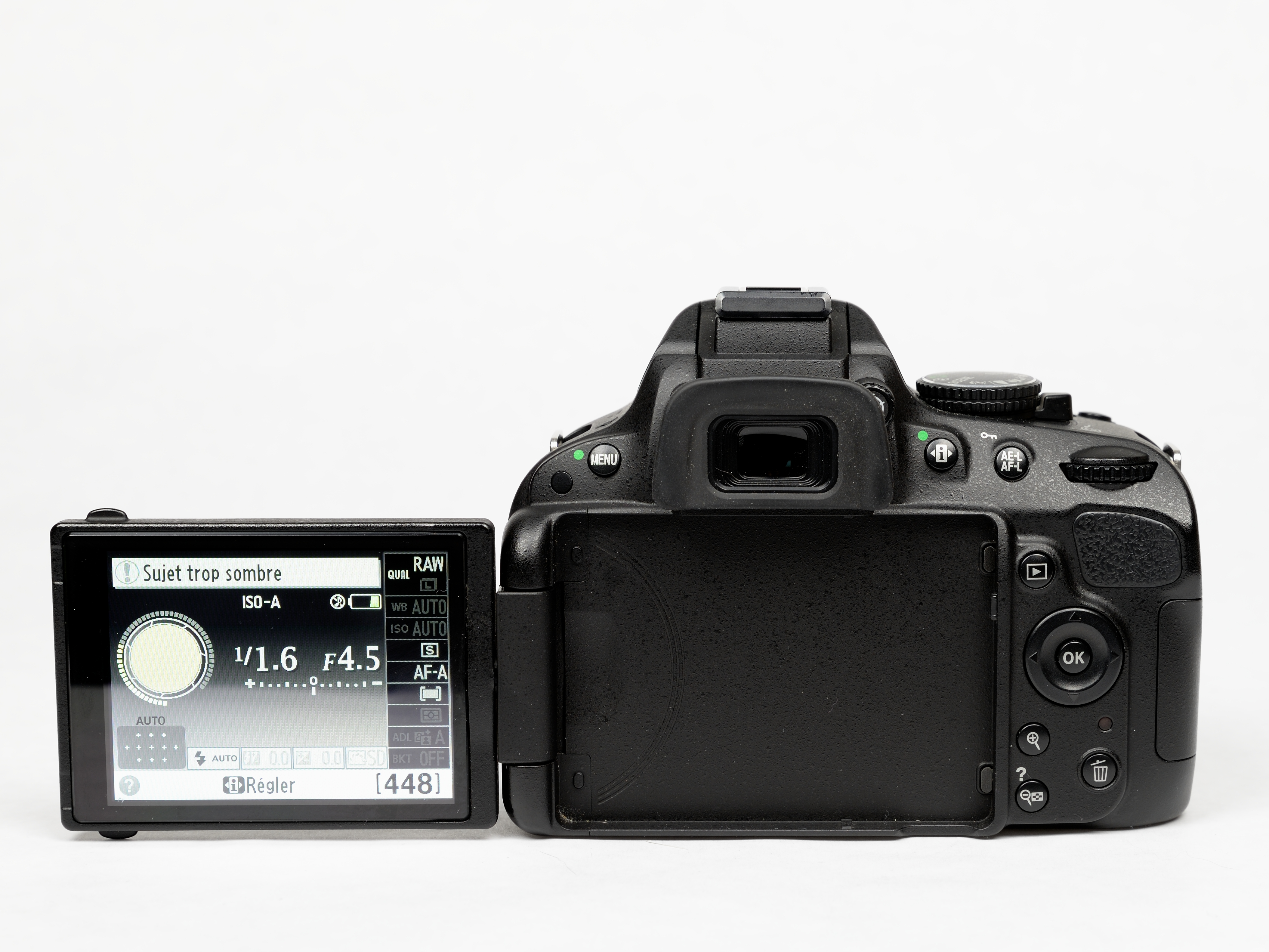 Appareil photo Nikon D5100 avec zom AF S DX Nikkor 18-55 mm.